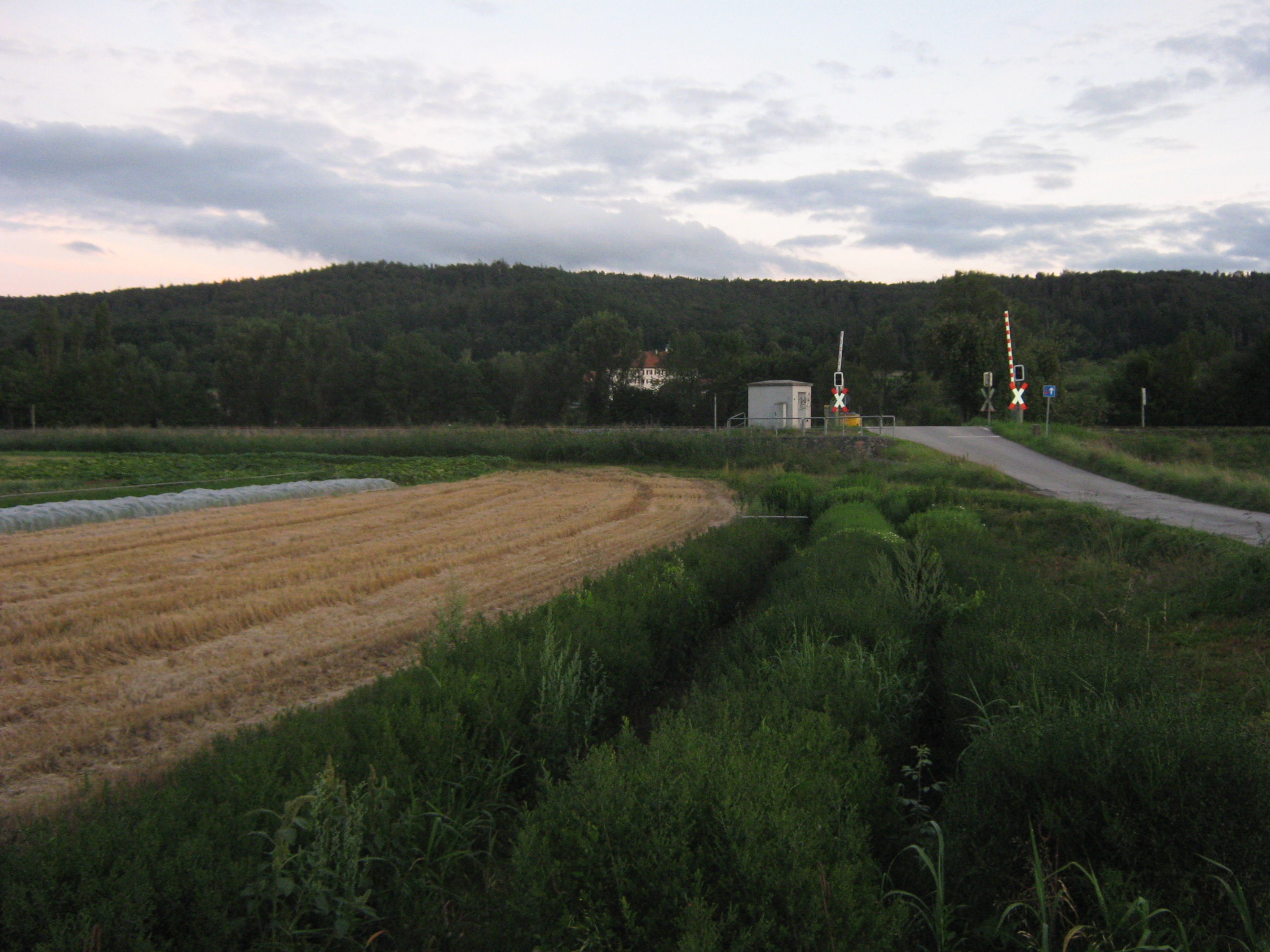 vorne: Landschaftsschutzgebiet Unteres Ammertal [1]; Bildmitte: Bahnübergang an der Ammertalbahn auf der Höhe der Domäne Ammern, die weiter hinten zu sehen ist; hinten: Landschaftsschutzgebiet Spitzberg am Hügelkamm